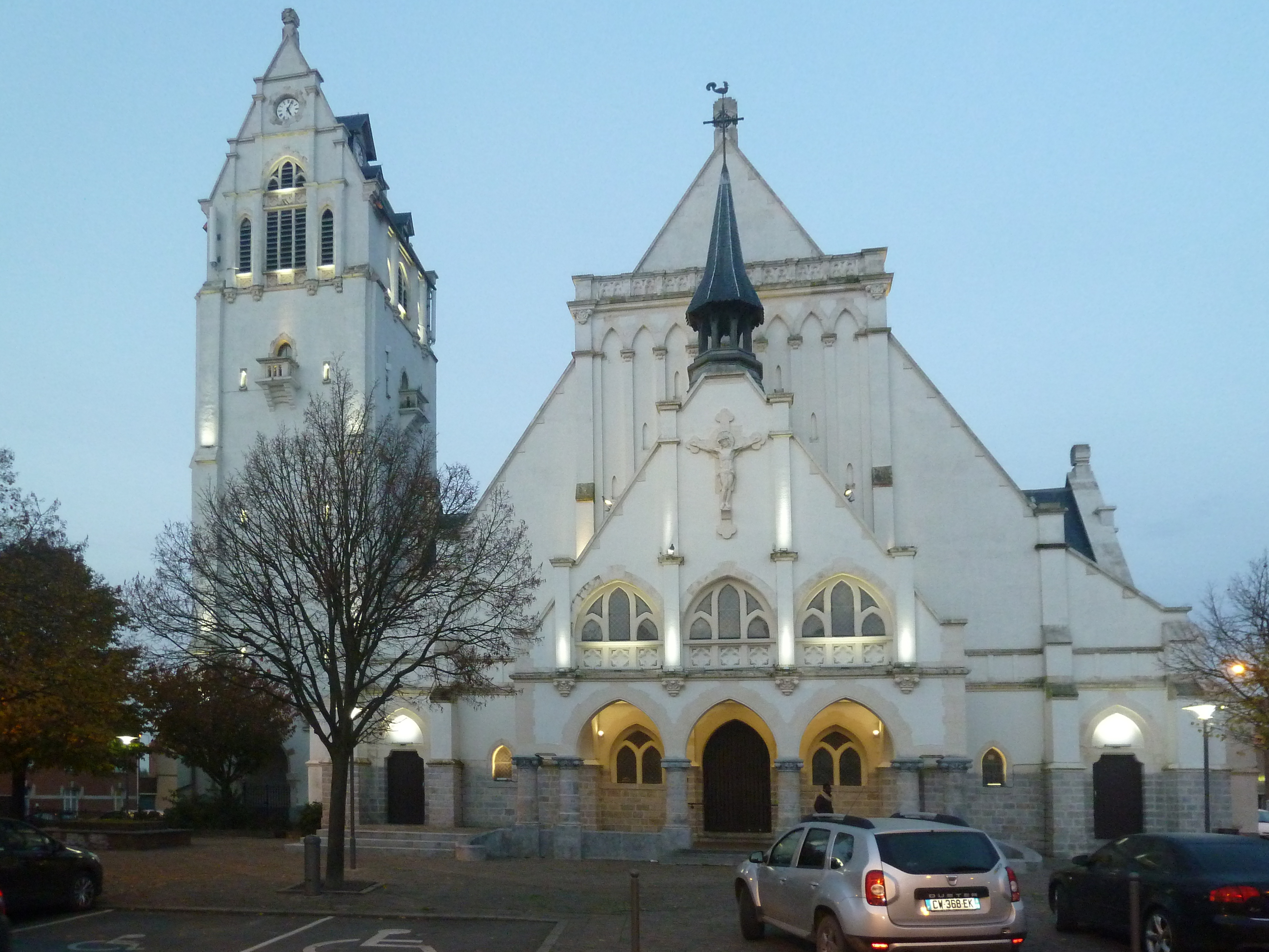 Eglise de la Nativité de Notre-Dame (Linselles) à Linselles Nord (département_français)